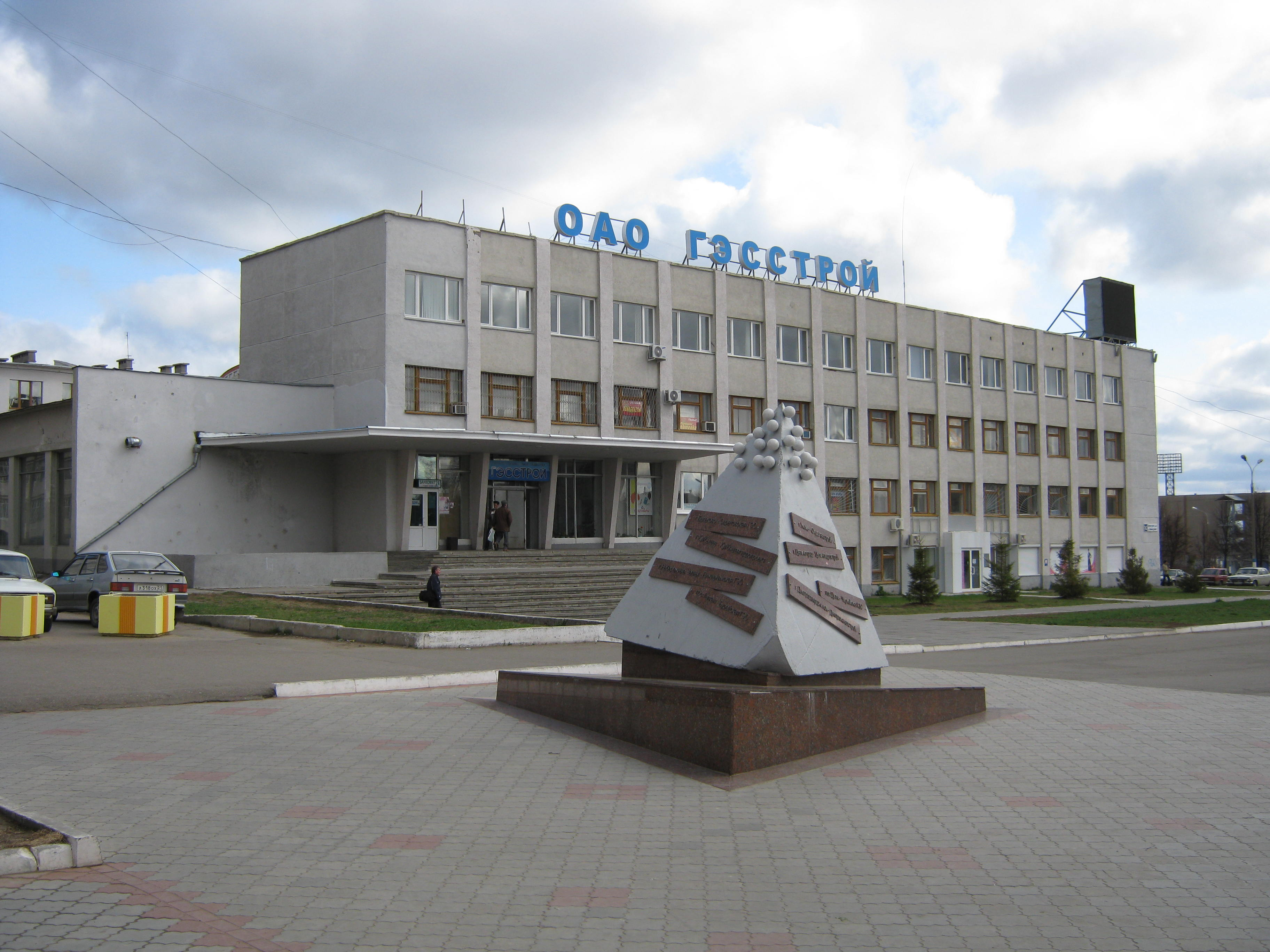 Собственная работа